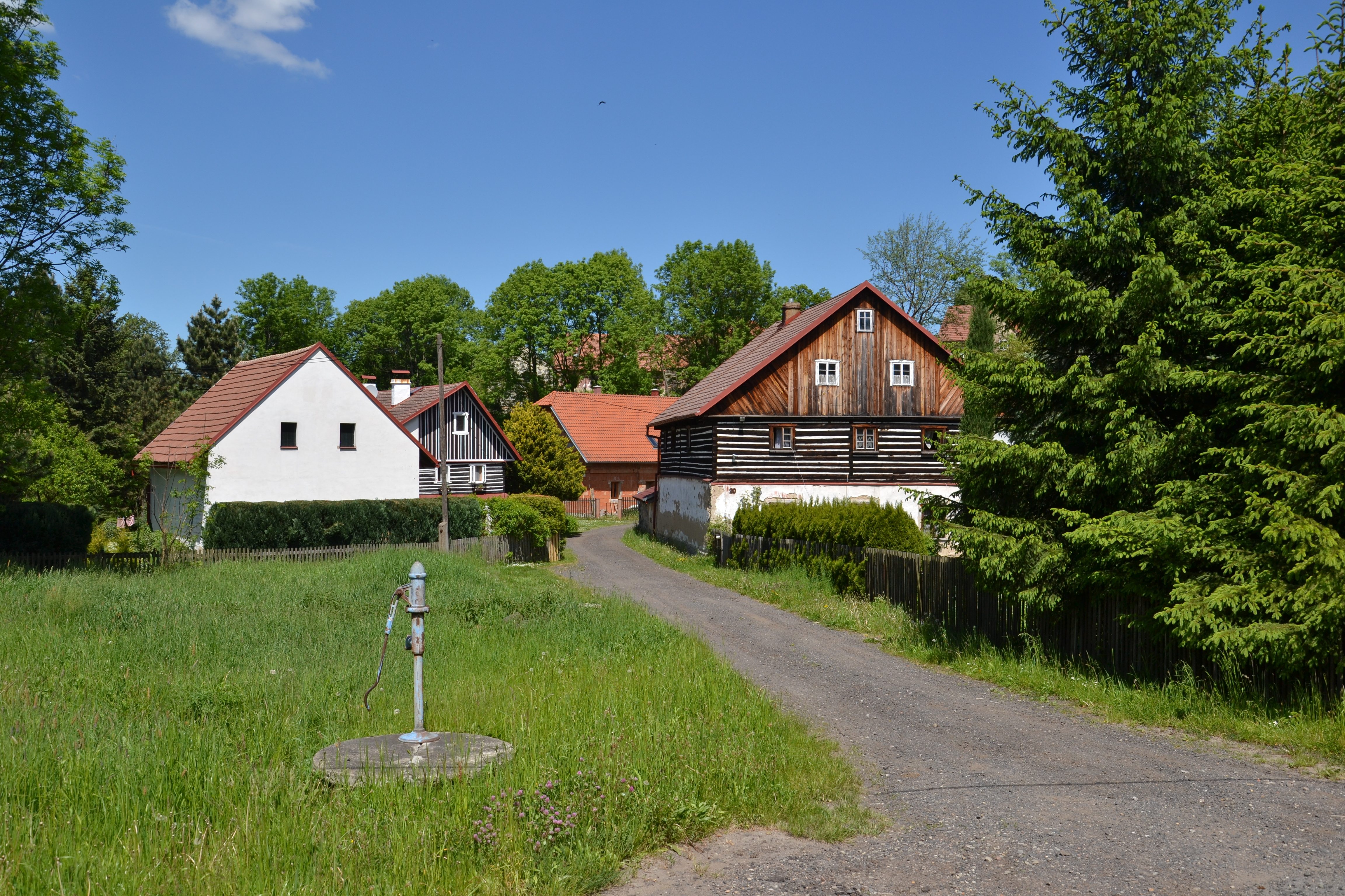 Touchořiny – střed vesnice